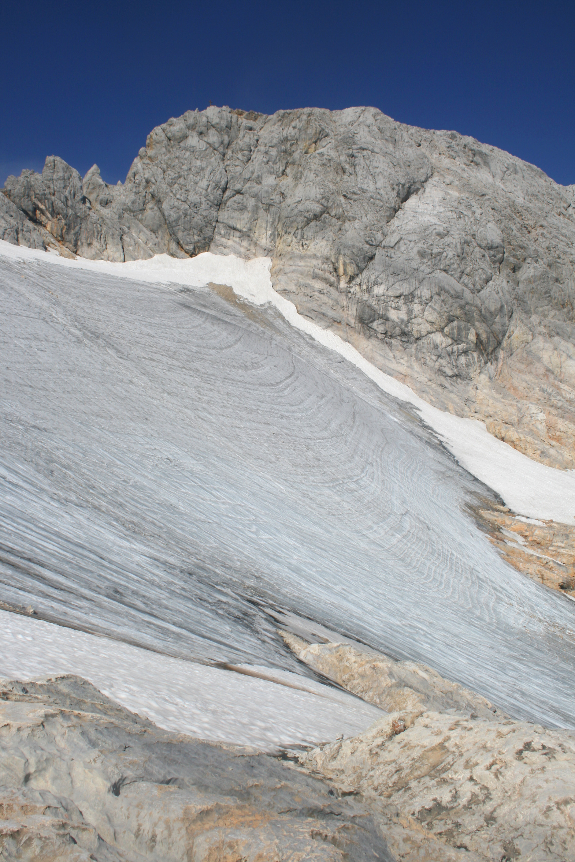 Hochseiler von Osten, davor der Westteil der Übergossenen Alm